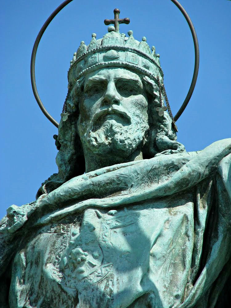 I. István szobra a Hősök téri Millenniumi emlékművön, Budapesten